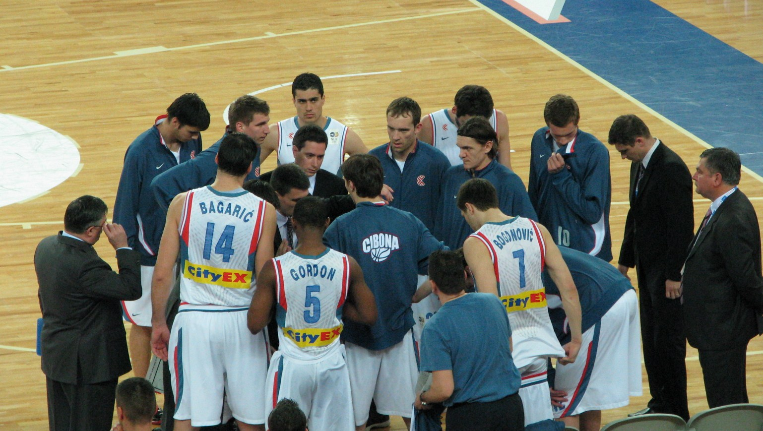 KK Cibona in NLB League Final, Arena Zagreb, 25/04/2010